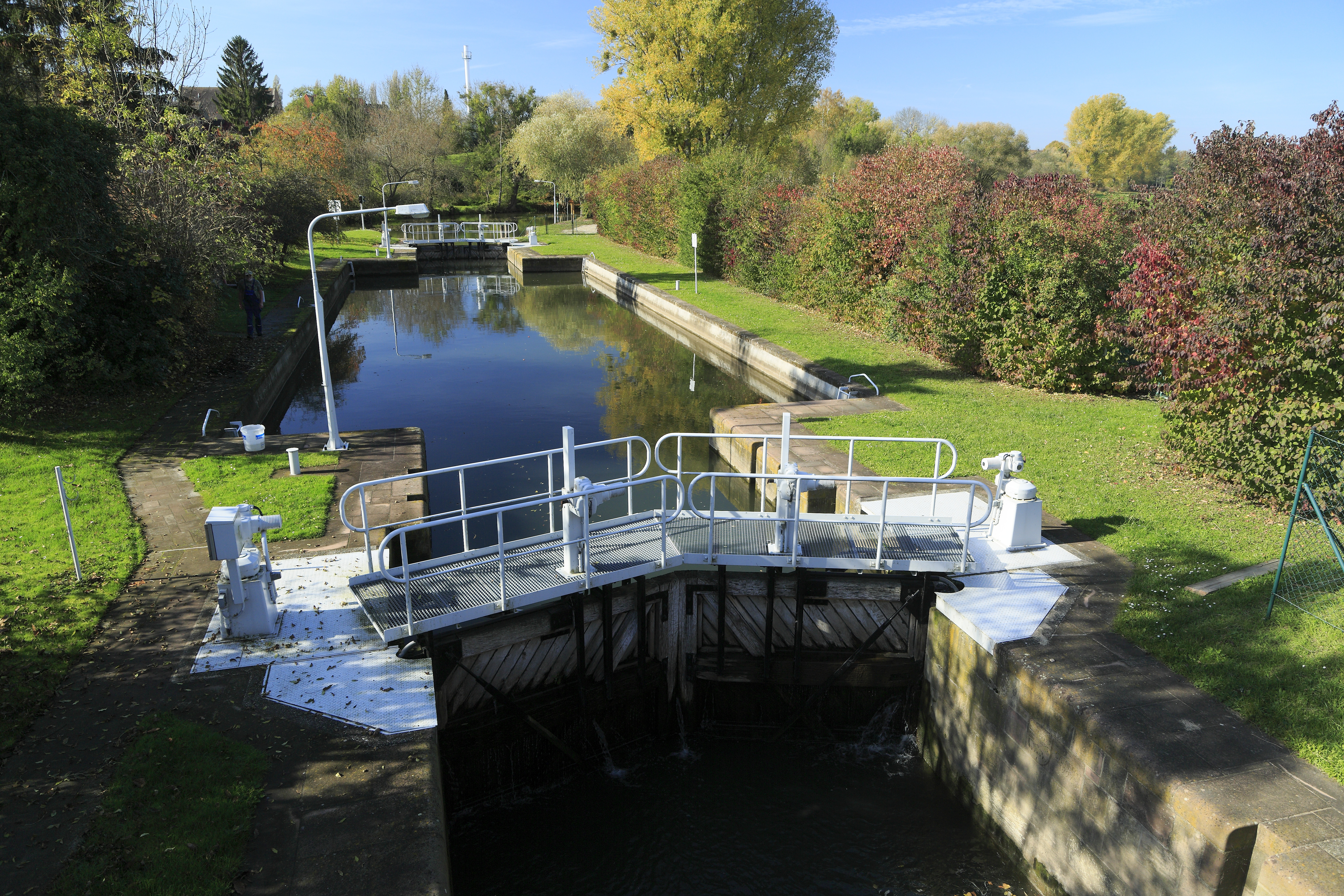 Westlich von der Brücke der L209, durch den Schleusenkanal entsteht auf der linken Bildseite eine künstliche Insel. Die Schleusenkammer ist ungewöhnlich breit, offenbar wurden zu Zeiten der Schleppschifffahrt mehrere Schiffe eines Schleppverbandes gleichzeitig und nebeneinander geschleust.